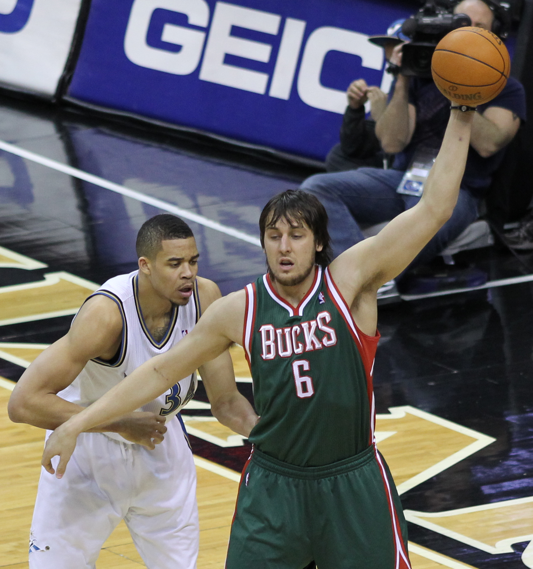 Wizards v/s Bucks 03/08/11